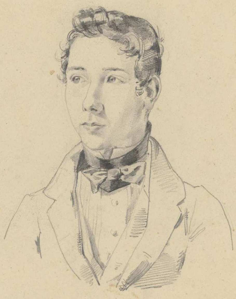 Retratos de Santiago y Vicente Masarnau, dibujo a lápiz grafito sobre papel agarbanzado. Biblioteca Nacional de España